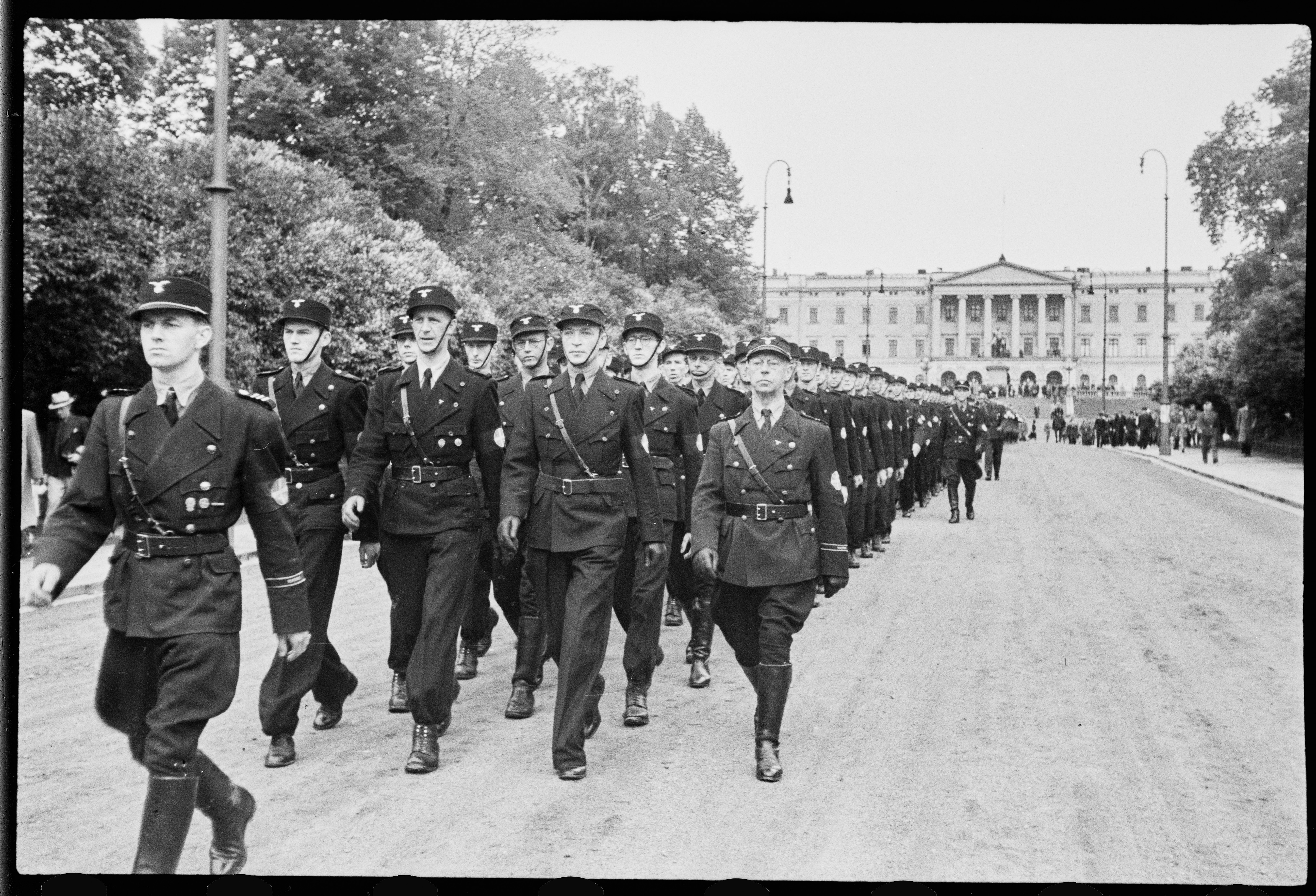 Reservebataljon Holmestrand paraderer for Quisling på Slottsplassen Ifølge fortrolig «NYHETSOVERSIKT FRA SKANDINAVIA. Fra Regjeringens I.K. og Hærens overkommando. (...) Meldinger söndag 14. juni. (1942)» foregikk paraden slik: «Reservebataljon Holmestrand mönstrer. (...) Imorges fant det sted en mönstring av reservebataljon Holmestrand av Den norske legion på Slottsplassen. Samtidig mönstret avdelinger av "förerens" garde, rikshirden og beredskapspolitiet. Avdelingene tok oppstilling i åpen firkant. På den ene siden stod legionens avdeling og dens musikkorps med front mot slottet med "förerens" garde og rikshirden på den annen side av beredskapspolitiet. Mange mennesker hadde innfunnet seg for å overvære mönstringen. Blant de frammötte såes samtlige "ministre", representanter for riksledelsen og en rekke andre representanter for stat og parti. "Föreren" ankom i bil presis kl. 09.30. Etter å ha inspisert avdelingene sammen med Jonas Lie og andre holdt han en kort tale.» Terje Emberland skriver i boka Himmlers Norge: «Som Kongsvinger festning var leiren i Holmestrand en SS-innretning som tjente til å forberede nordmenn på det fremtidige SS-kontrollerte Norge. På ulike tidspunkter var det senter for opplæring av Hirden, Den norske legions reservebataljon og Vaktbataljonen.»